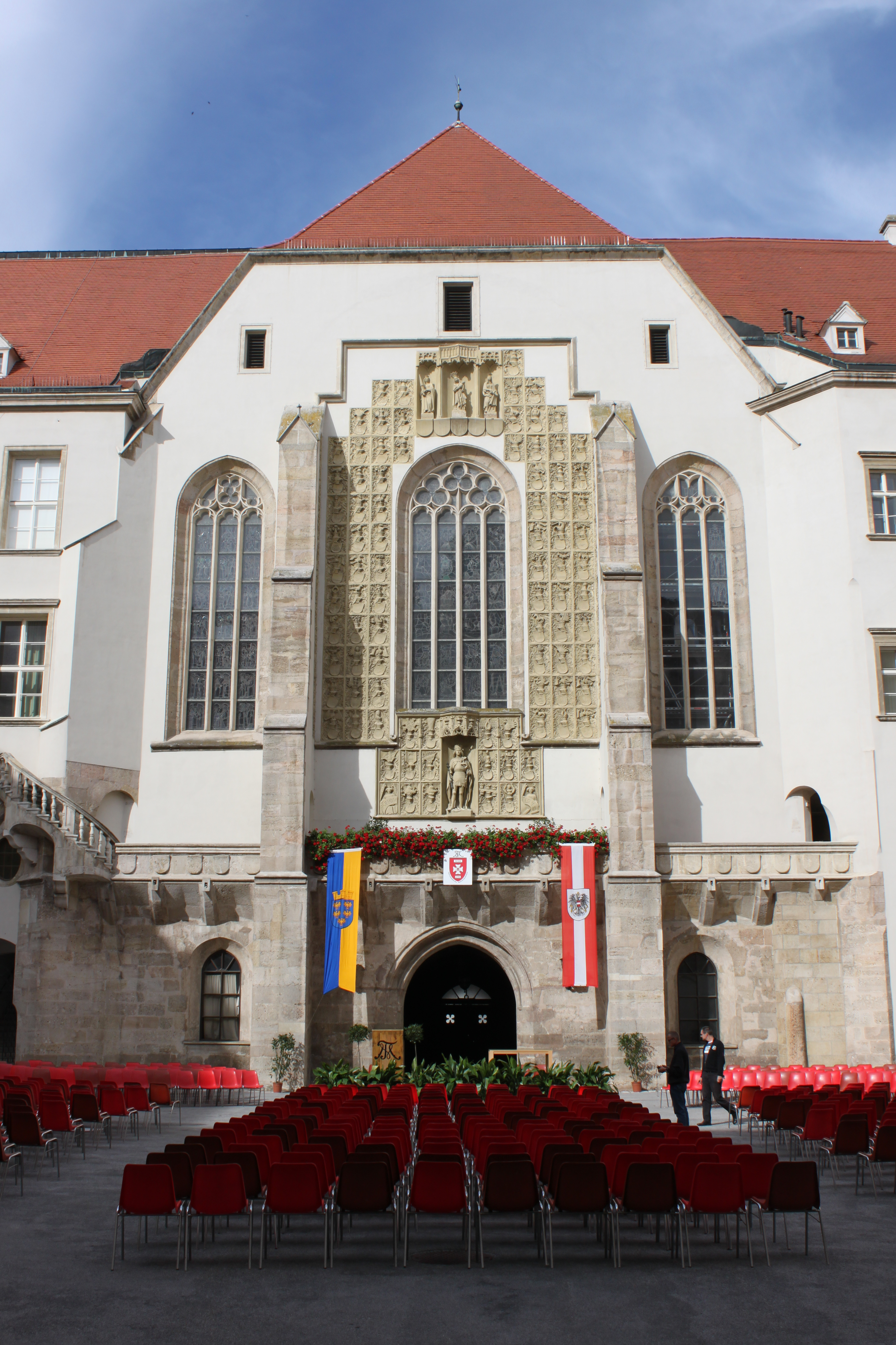 Georgskapelle, Wappenwand Burg Wiener Neustadt, Bestuhlung für die Ausmusterung der Theresianischen Militärakademie